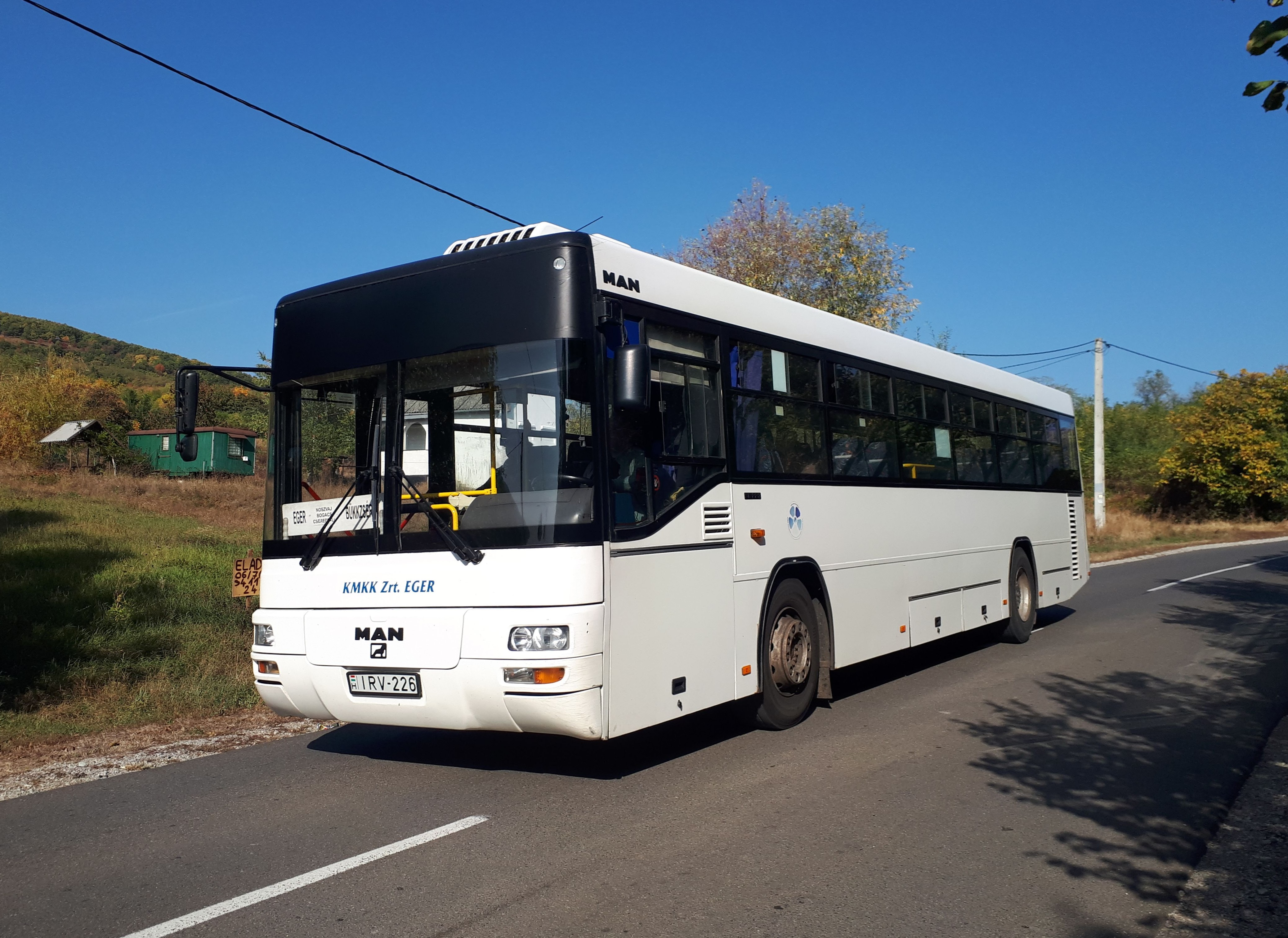 A KMKK IRV-226 rendszámú MAN SL 223 típusú busza Bükkzsérc közelében, a 3417-es helyközi járaton.